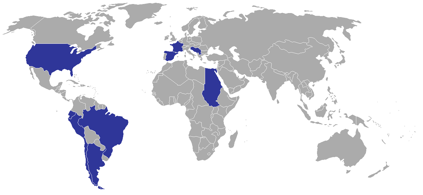 Paises participantes del Campeonato Mundial de baloncesto de 1950